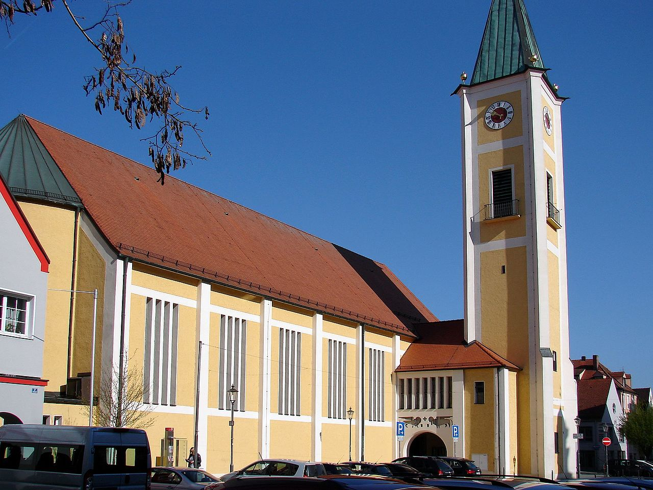 Katholische Stadtpfarrkirche - Zu Unserer Lieben Frau